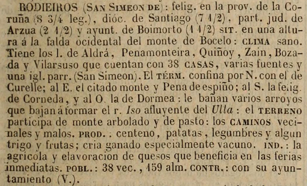 Rodieiros no Diccionario geográfico-estadístico-histórico de España y sus posesiones de Ultramar.